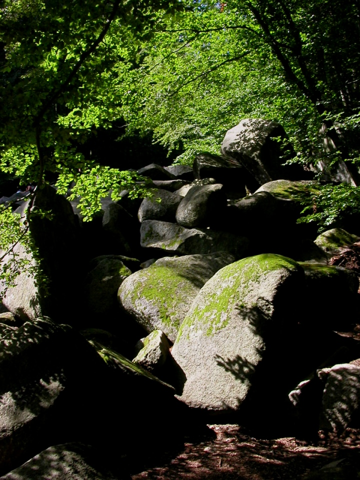 Das Felsenmeer in Lautertal/Odenwald